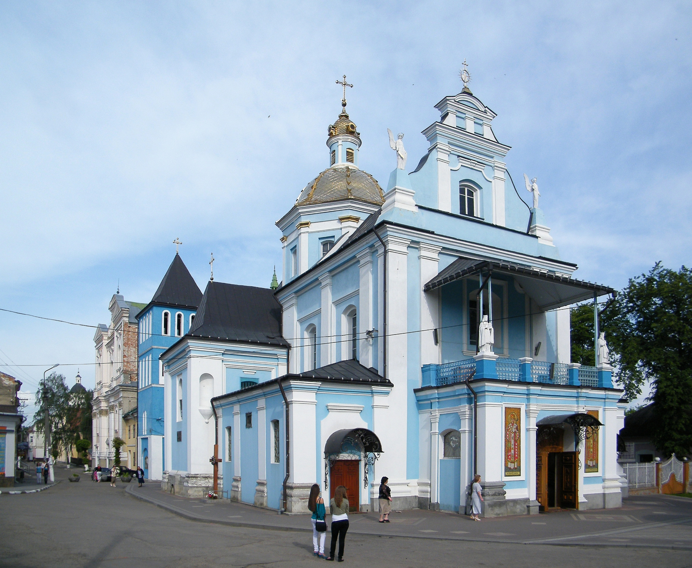 Храм Рождества Пресвятой Богородицы